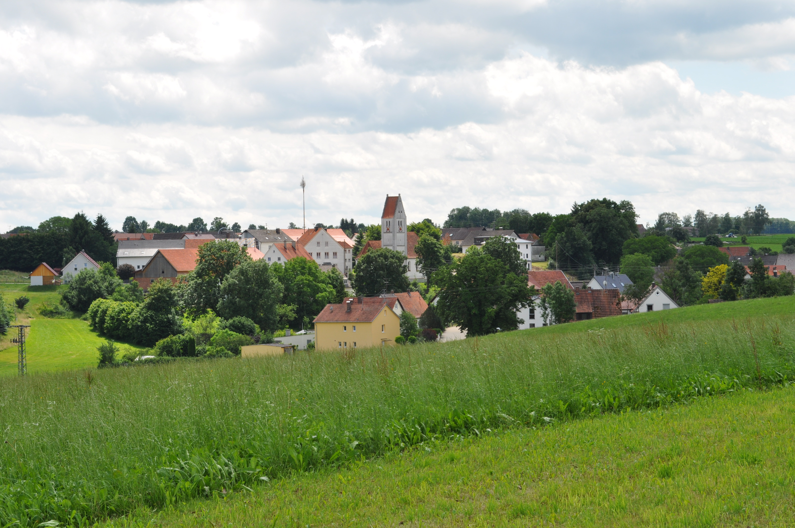 Hafenhofen ein Ortsteil von Haldenwang im Landkreis Günzburg (Bayern)